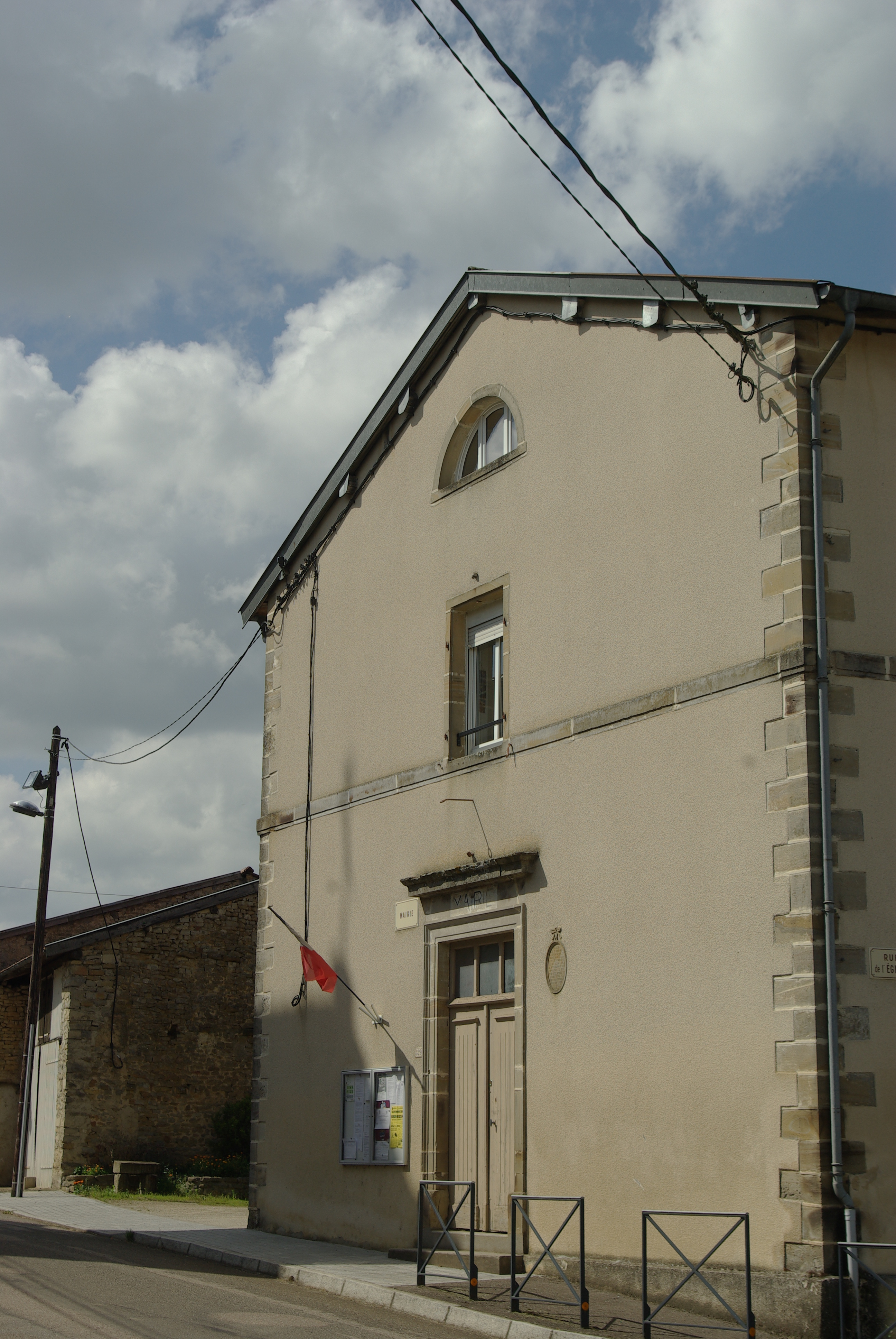 Mairie de Saint-Prancher (88)